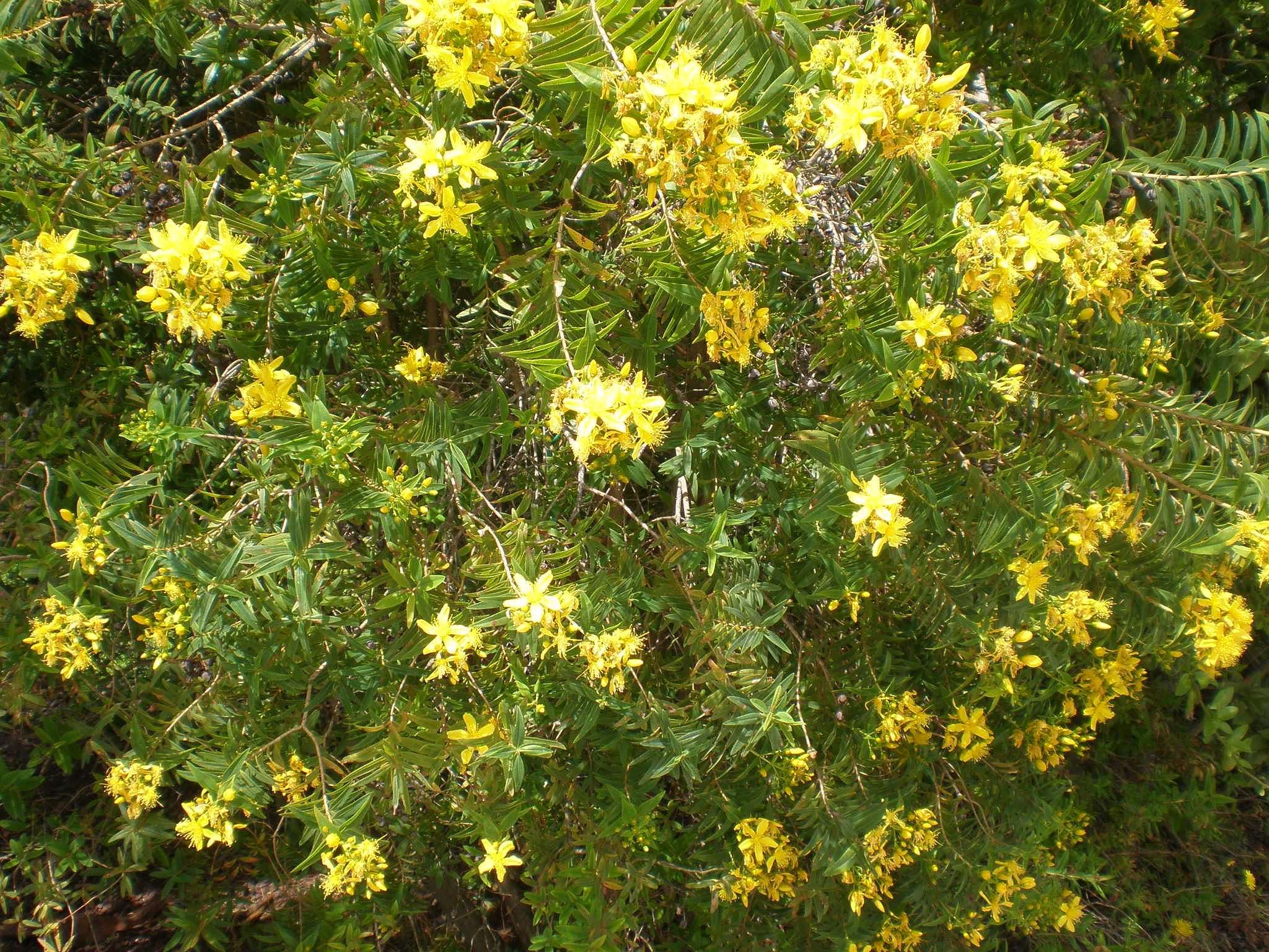 Jardín Botánico de Barcelona.